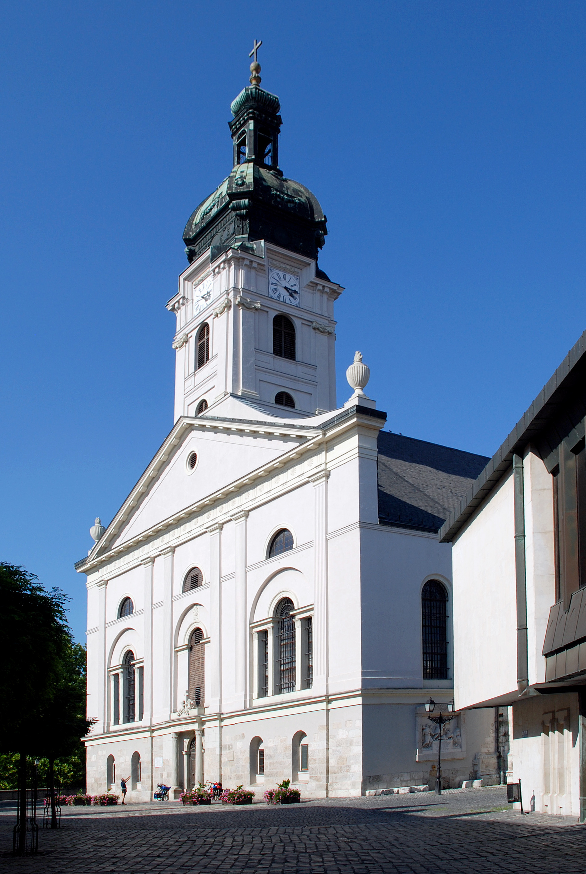 Györ, Ungarn: Liebfrauendom